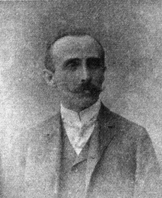 Österreichischer Politiker, Reichsratswahl 1907, Name siehe Dateiname